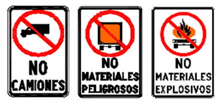 Dibujos de señales del Manual Centroamericano de Dispositivos 2000